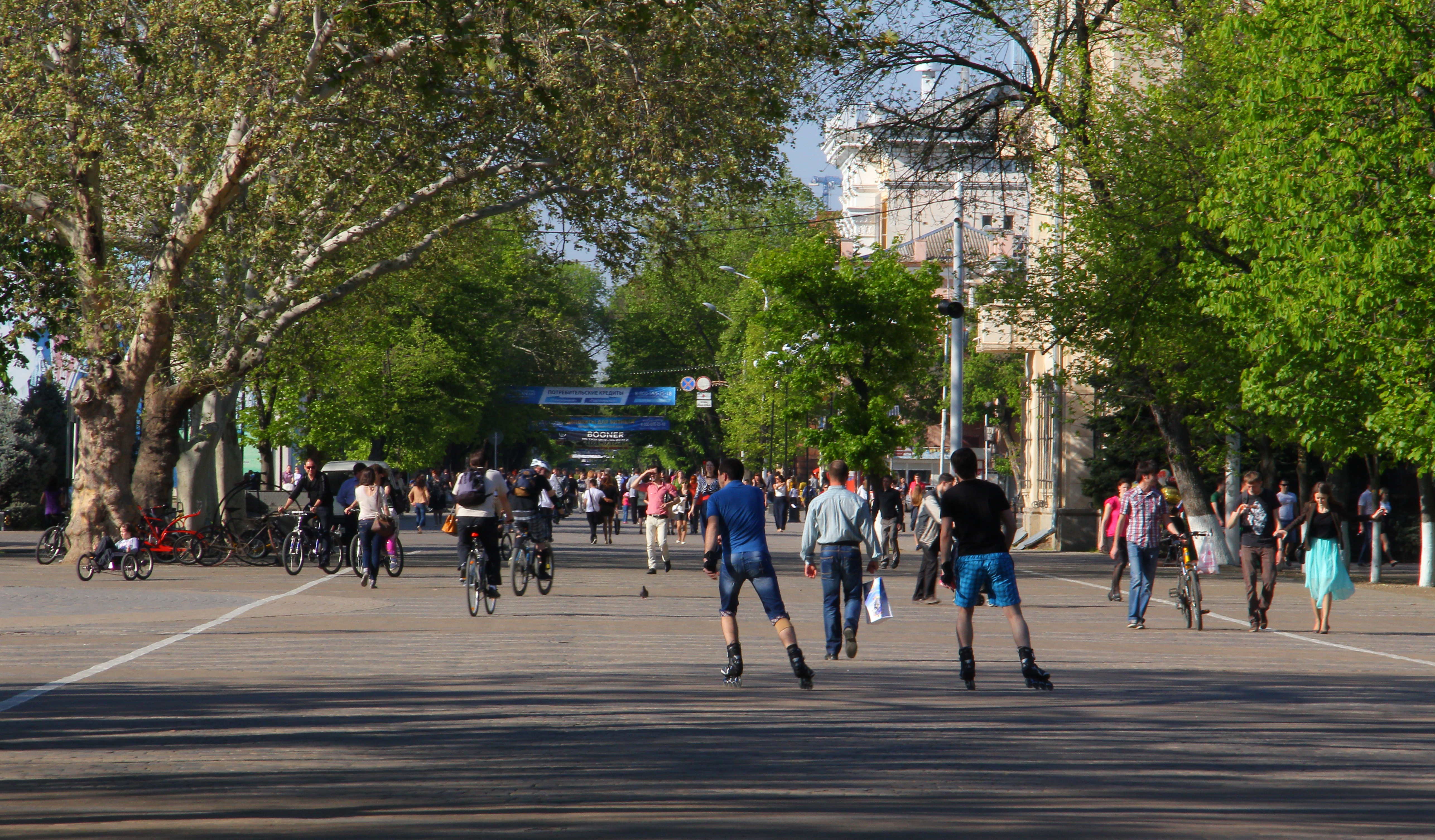 Zapadnyy okrug, Krasnodar, Krasnodarskiy kray, Russia